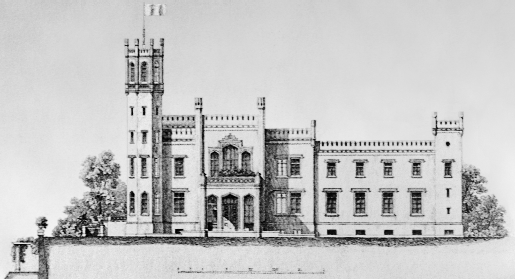 Schloss Kittendorf, Deutschland, Zeichnung der Eingangsseite des Schlosses, aus: Friedrich Hitzig "Ausgeführte Bauwerke", 1850/67